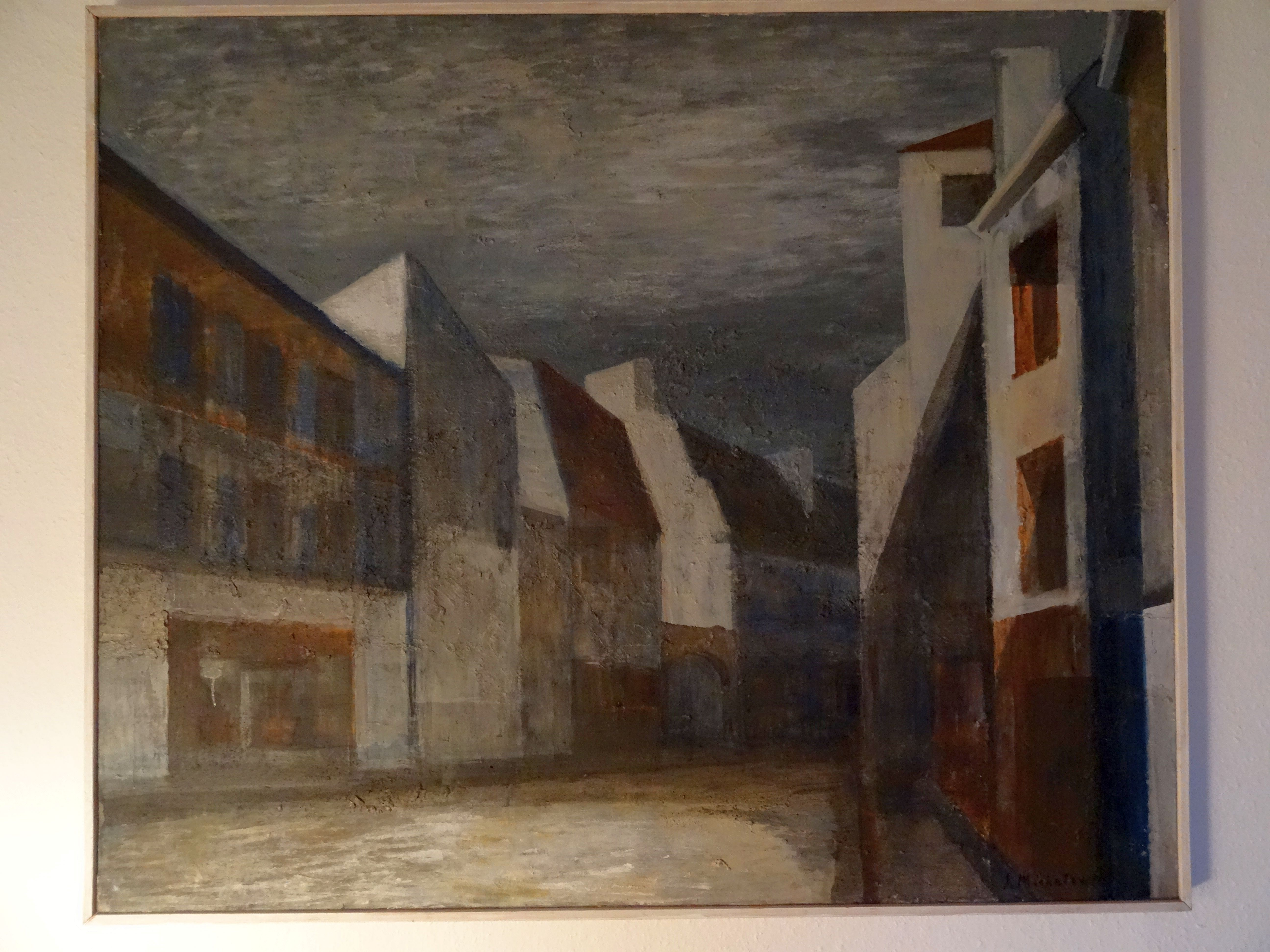 Bild / obraz Stanisław Michałowski bez tituł / ohne Titel Strassenansicht